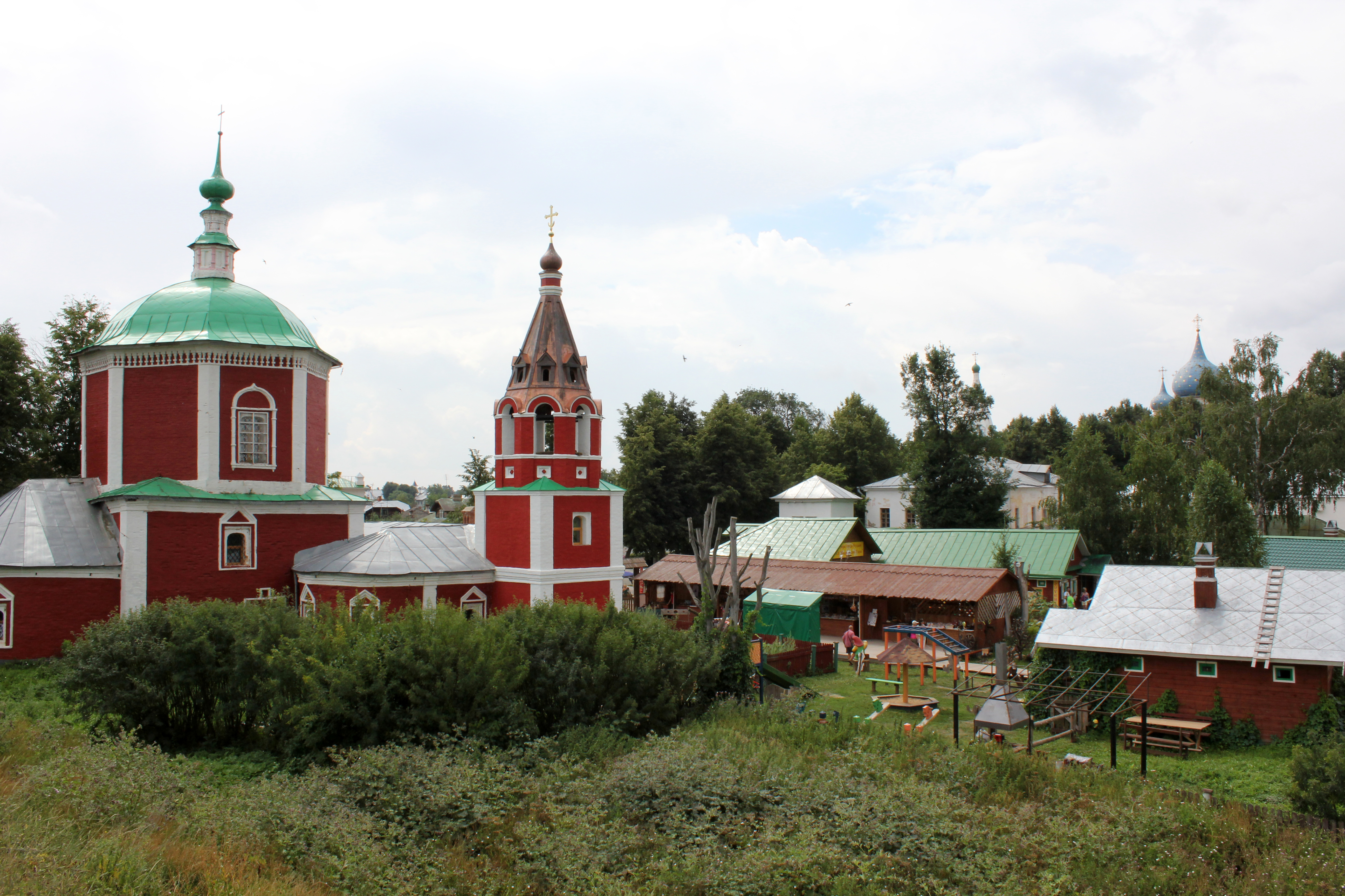 Церковь Успения Пресвятой Богородицы (церковь Успенская) (Владимирская область, Суздаль, Кремлевская улица)